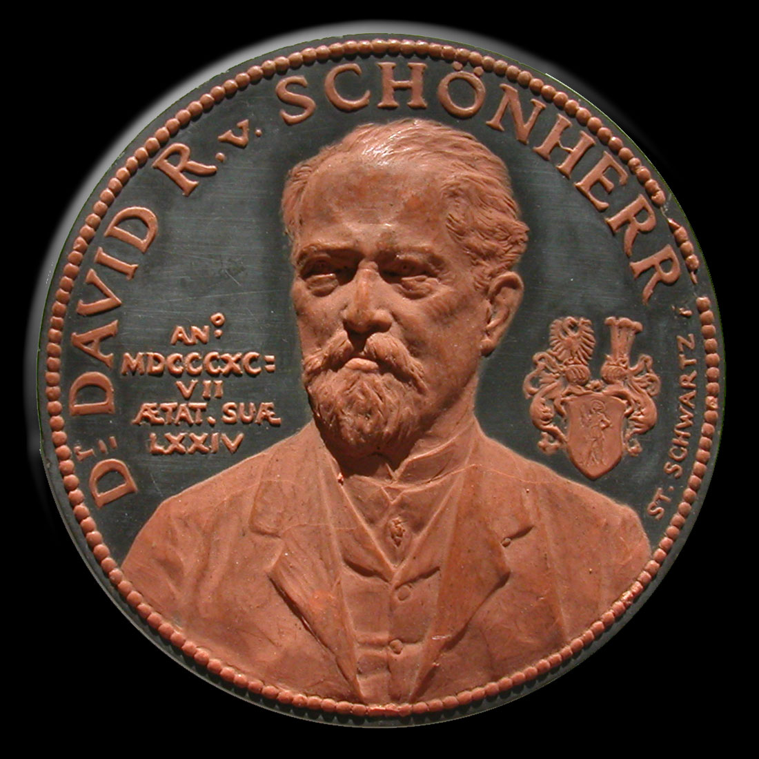 Der Tiroler Historiker Dr. David Ritter von Schönherr (1822-1897), Medaille von Stefan Schwartz